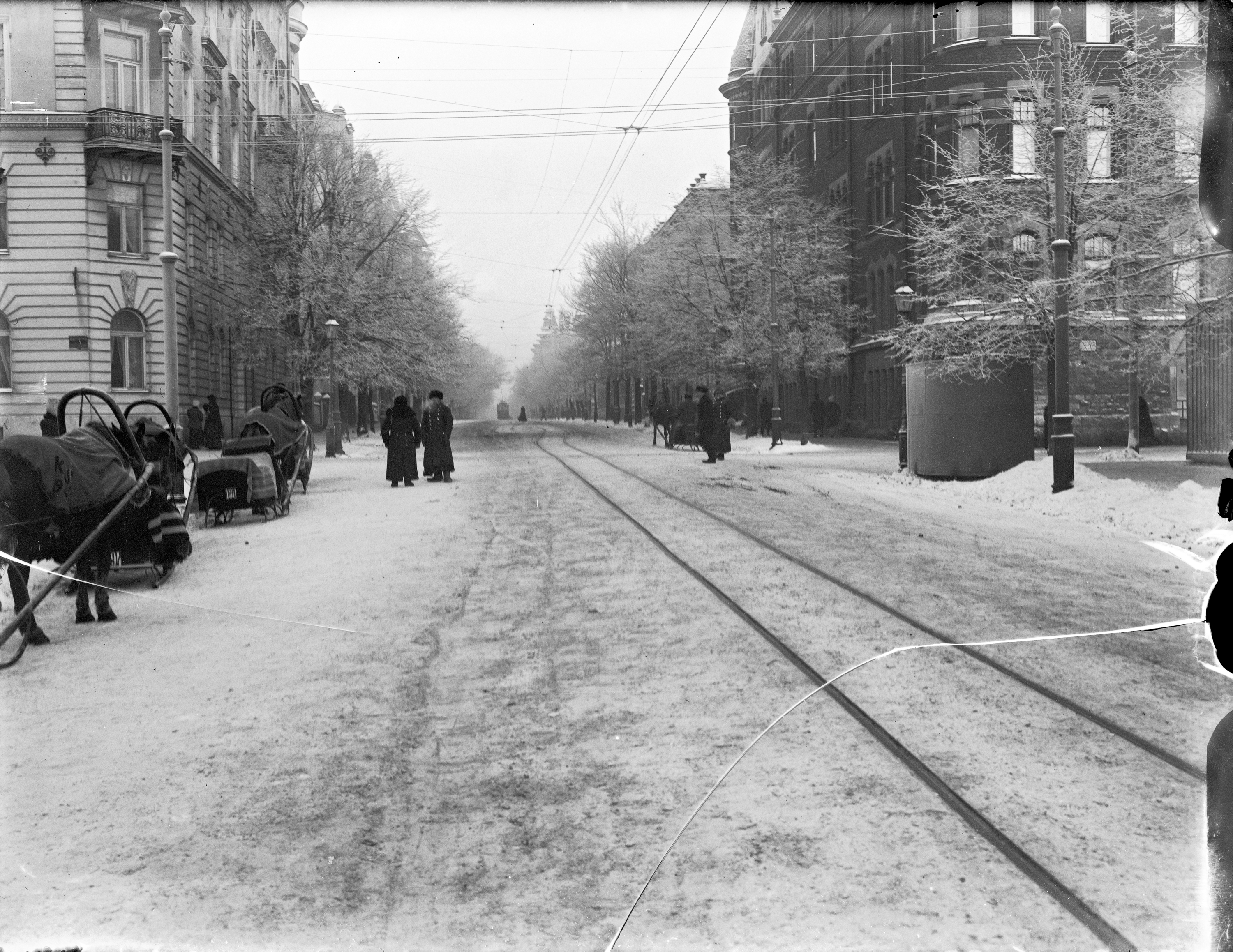 Bulevarden. Foto Gustaf Sandberg. Ur boken Helsingfors i ord och bild Utgiven av Svenska litteratursällskapet i Finland, 2012